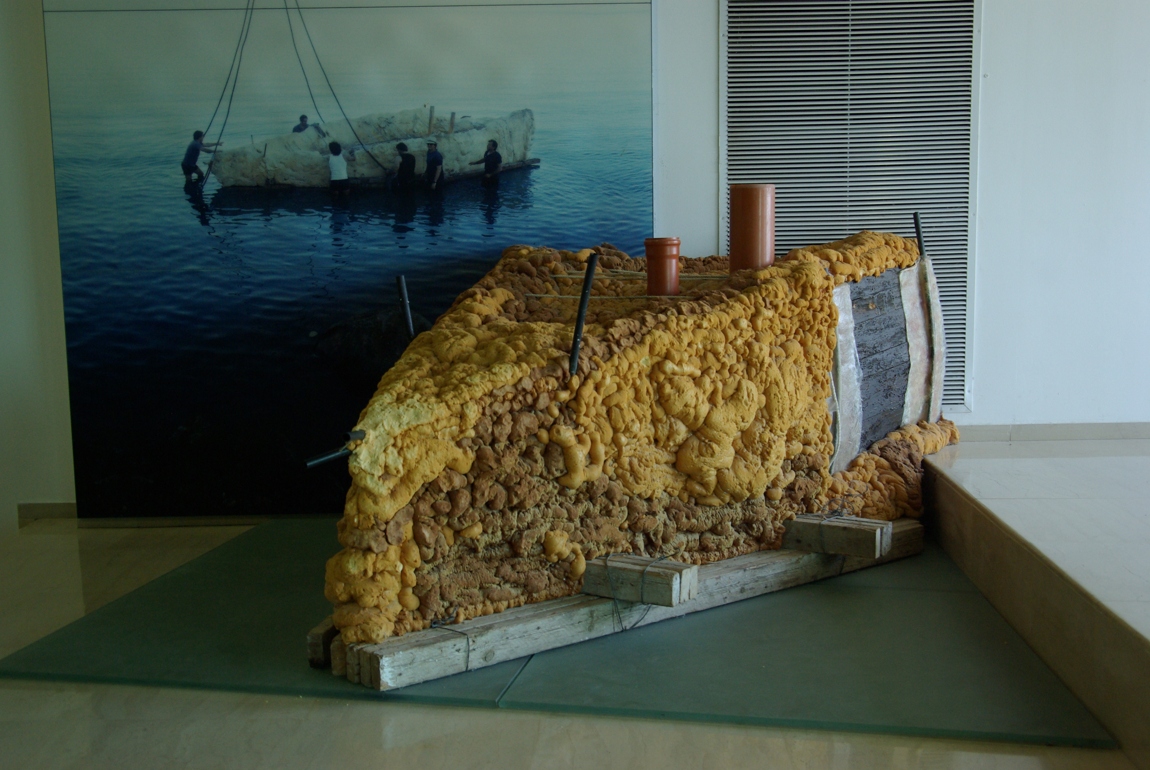 Kibbuz Ginnossar, Yigal Allon Center